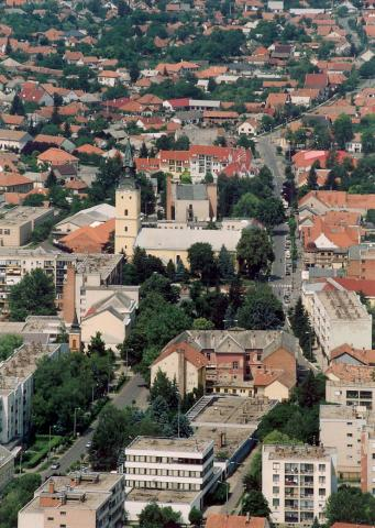 Hajdúnánás, Hungary, aerialphotography